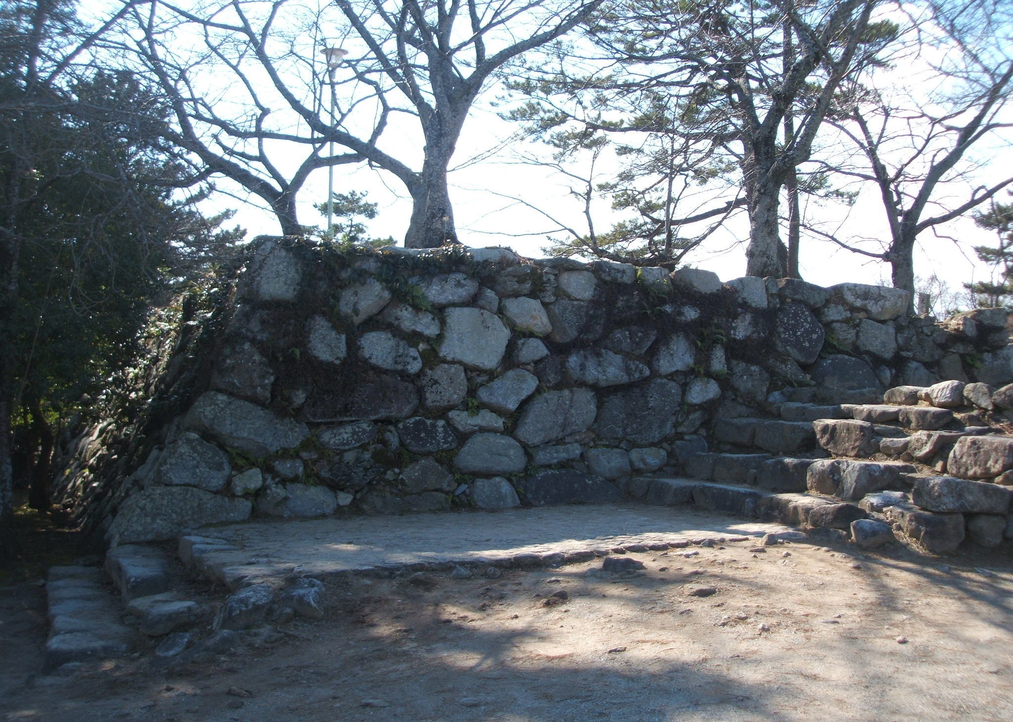 松坂城天守台跡